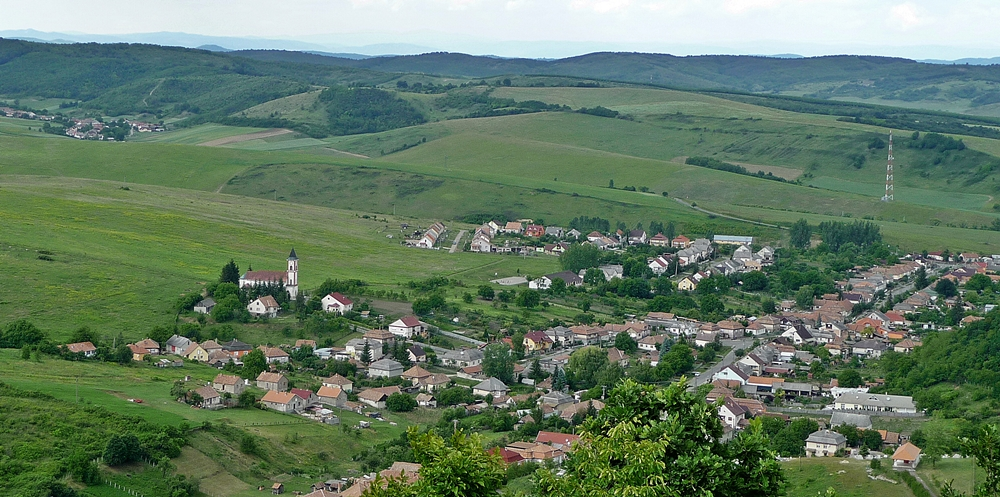 Nagybárkány látképe